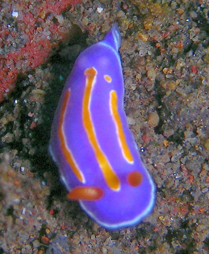 Pectenodoris trilineata